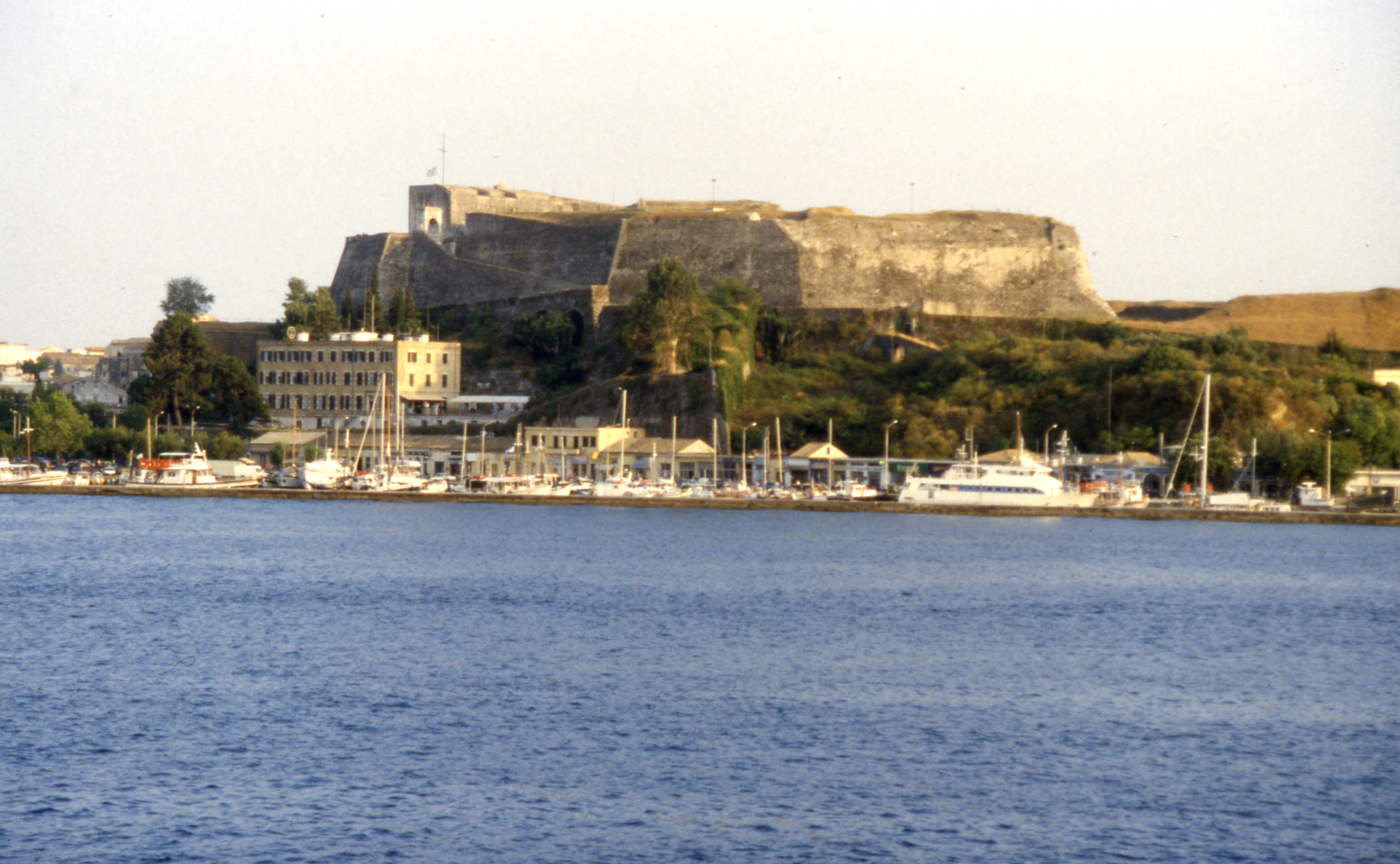 Korfu vom Meer